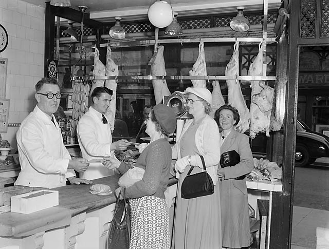 Teitl Cymraeg/Welsh title: Harry Morris, cigydd yng Nghroesoswallt yn dathlu diwedd dogni cig gyda rhai o'i gwsmeriaid Ffotograffydd/Photographer: Geoff Charles (1909-2002) Dyddiad/Date: July 1, 1954. Cyfrwng/Medium: Negydd ffilm / Film negative Cyfeiriad/Reference: (gch06300) Rhif cofnod / Record no.: 3367765 Rhagor o wybodaeth am gasgliad Geoff Charles yn Llyfrgell Genedlaethol Cymru More information about the Geoff Charles Collection at the National Library of Wales